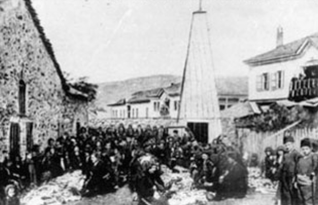 Batak massacre Massaker von Batak Bulgarien 1876